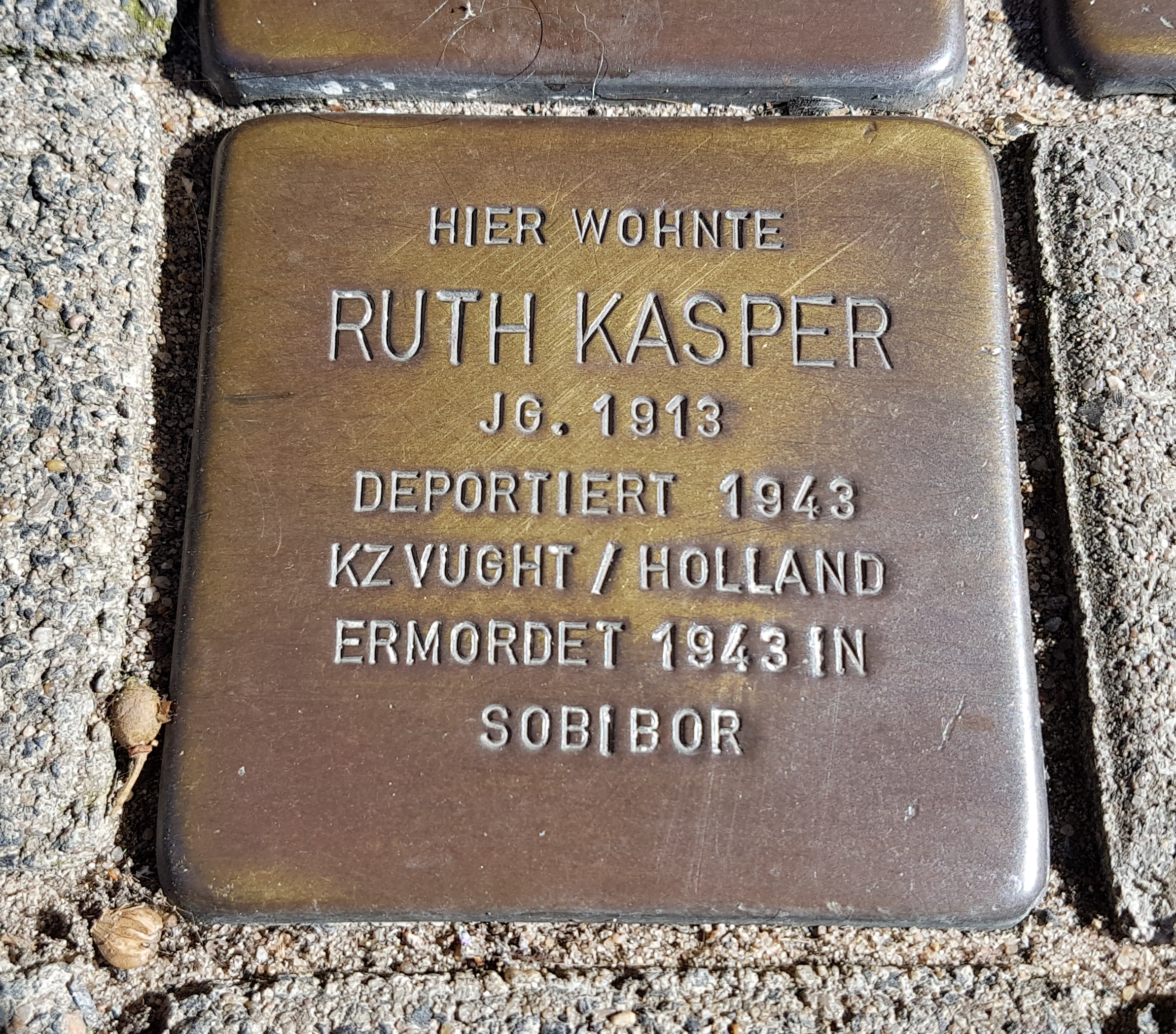 Stolperstein Duisburg Ruth Kasper